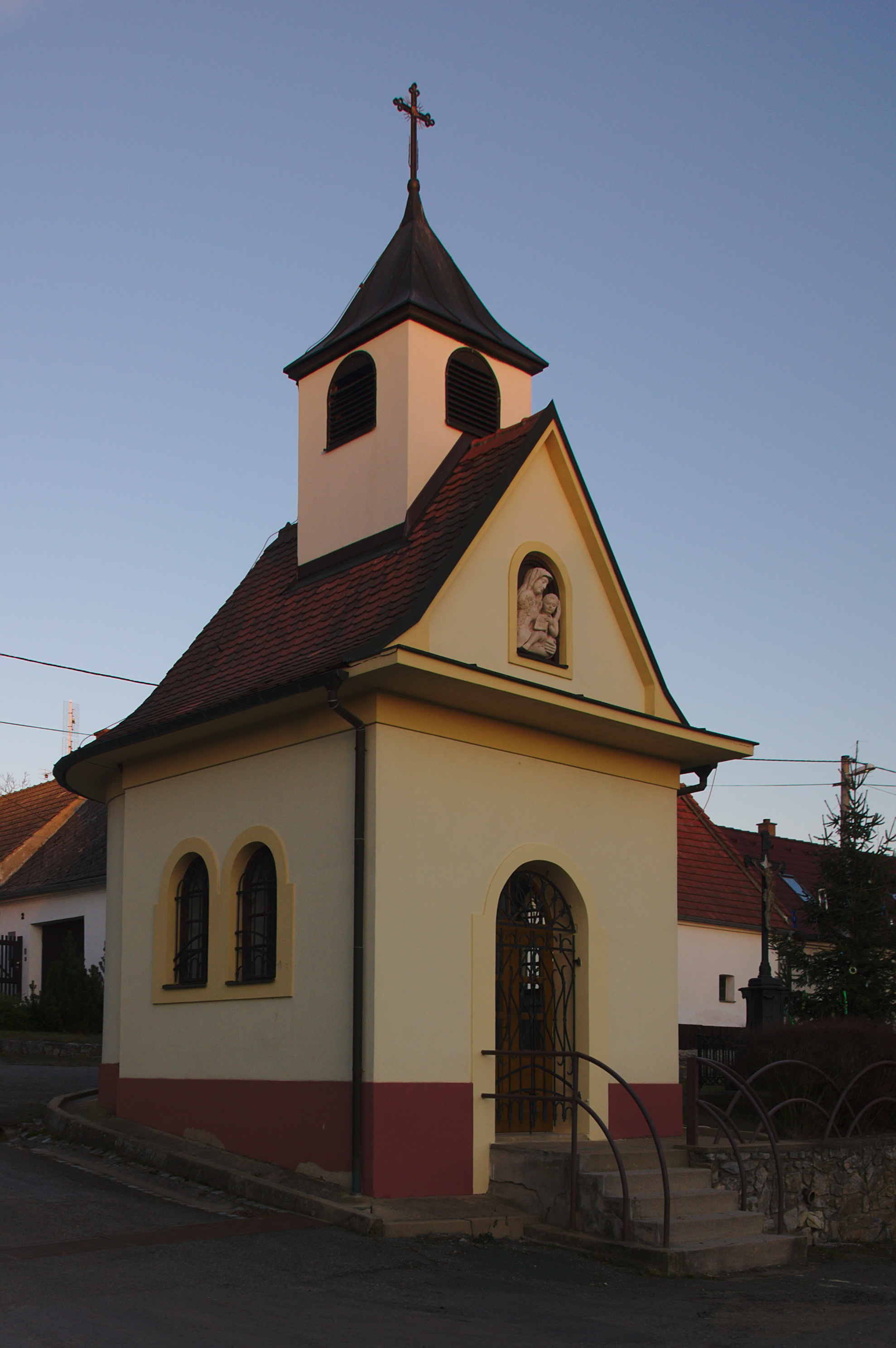 Kaple svaté Anny, Suchdol, Vavřinec, okres Blansko